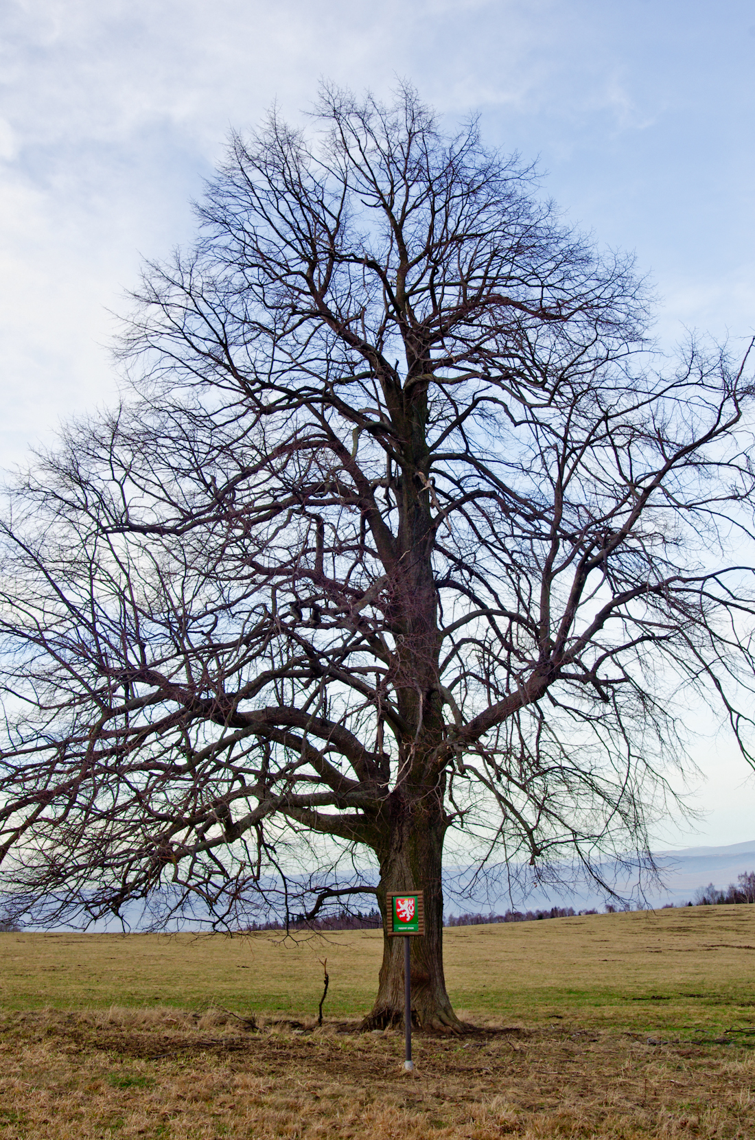 památný strom - lípa na Paseckém vrchu